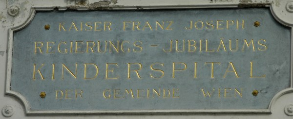 Tafel am ehemaligen Haupteingang zum Wilhelminenspital am Flötzersteig (Wien-Ottakring)